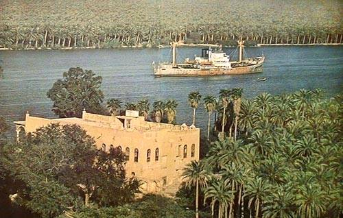 Shatu Al-arab, in Basraeh, Iraq